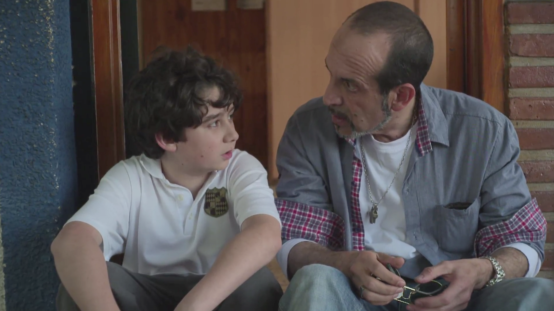 Alejandro Fiore (derecha) El Mal Menor, unitario emitido por la TV Pública, Argentina